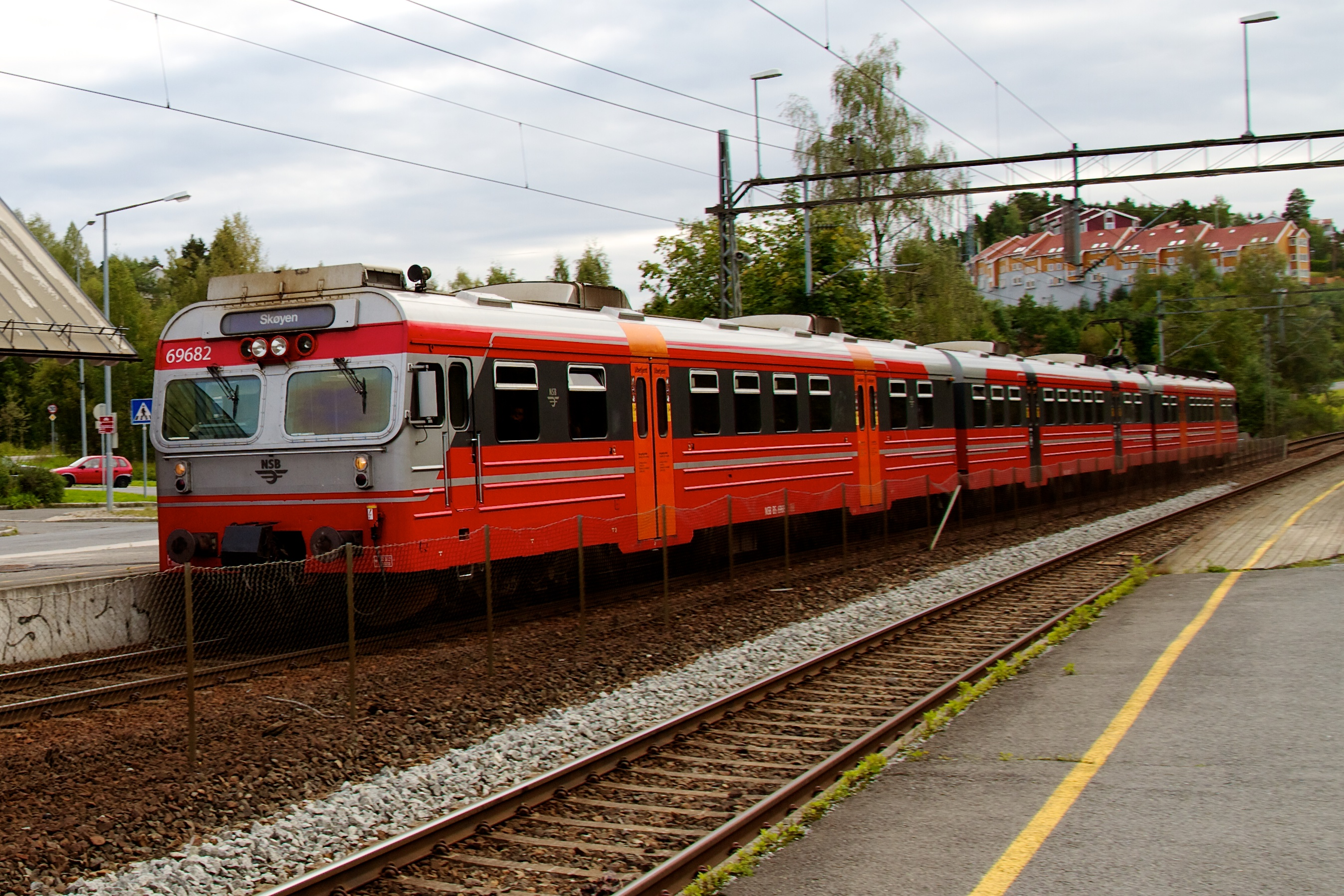 NSB type 69 (69682), Hauketo stasjon.